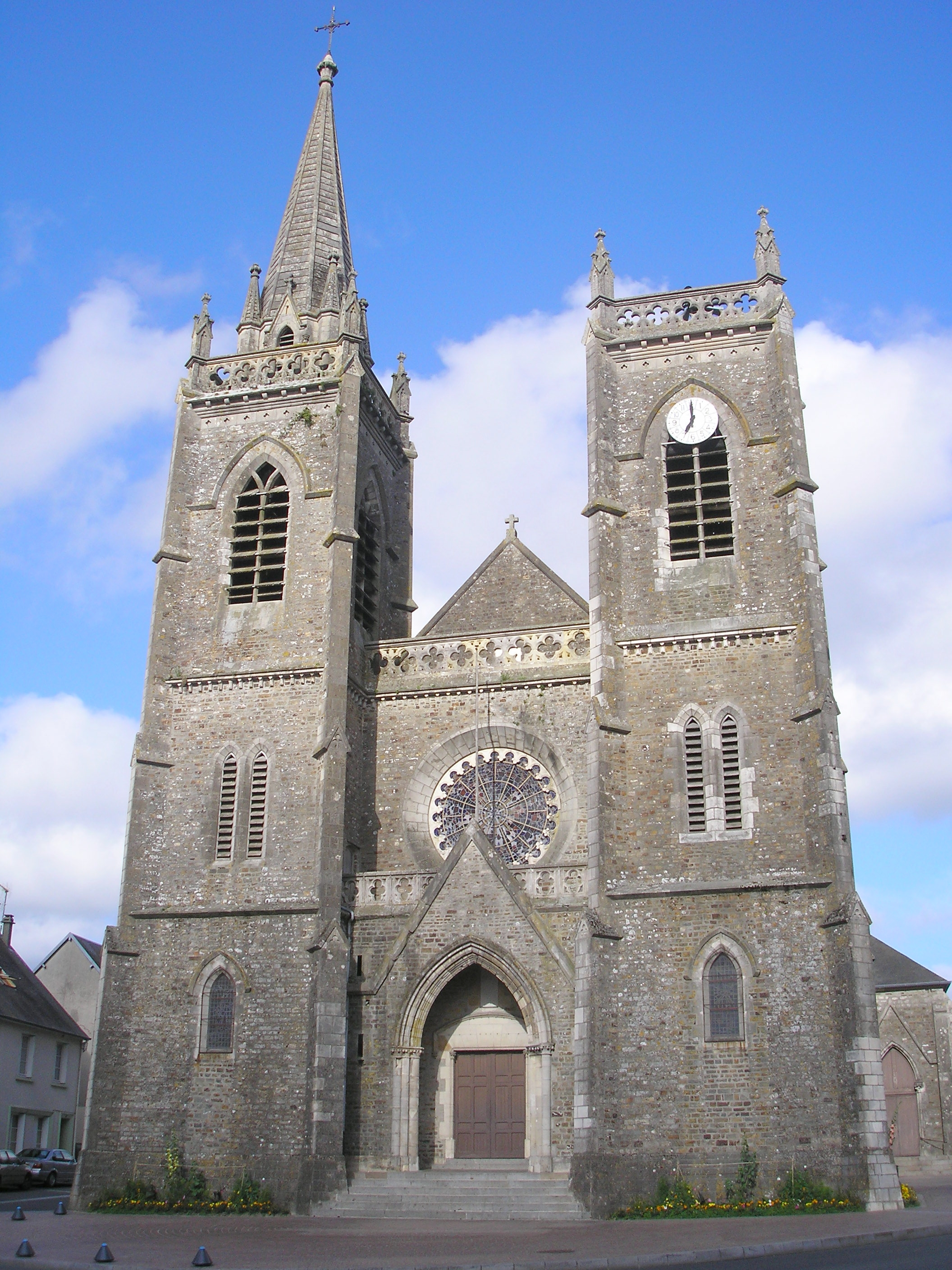 La Haye-du-Puits (Normandie, France). L'église.